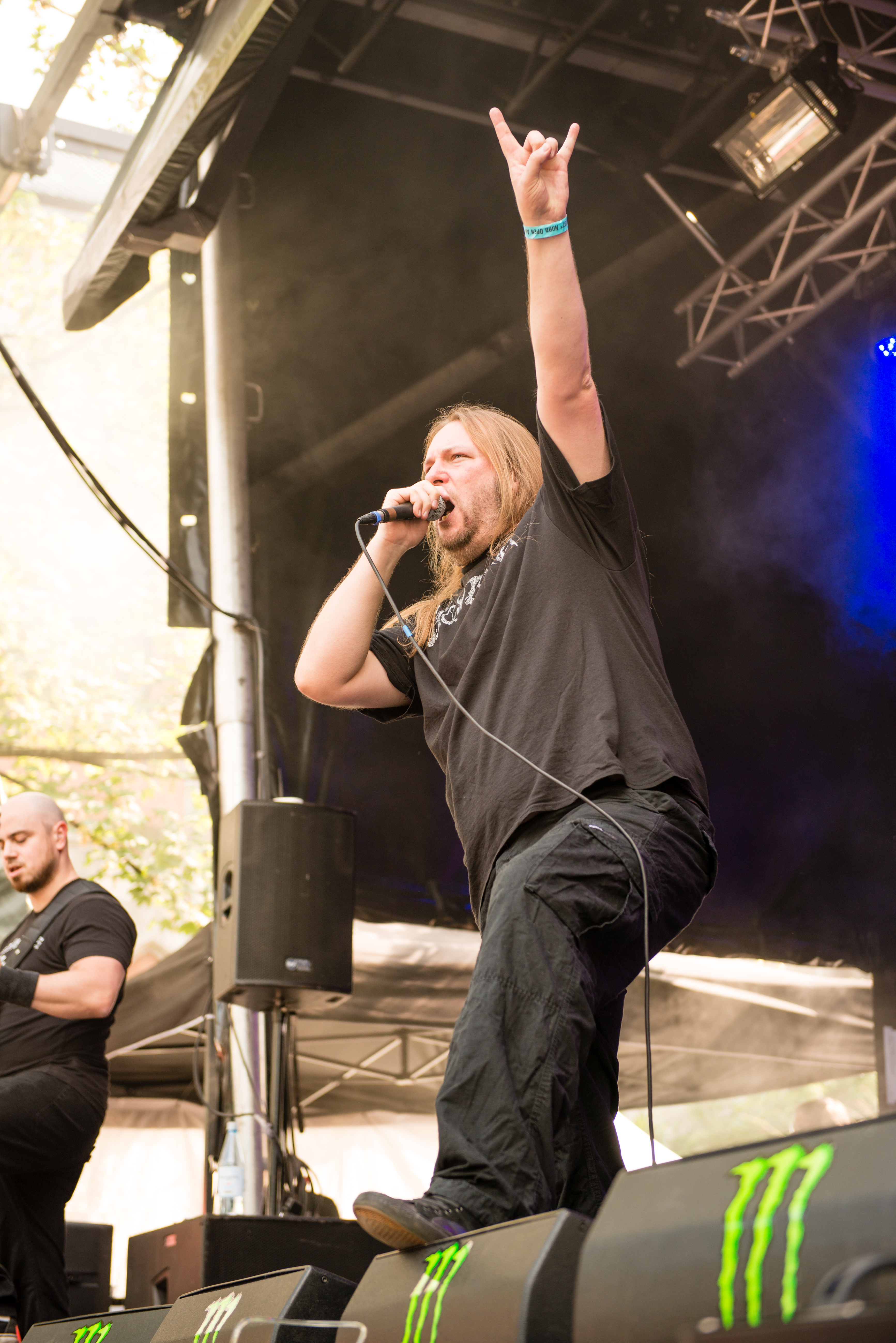 'Nord Open Air 2014 - Essen': 'Dew-Scented'